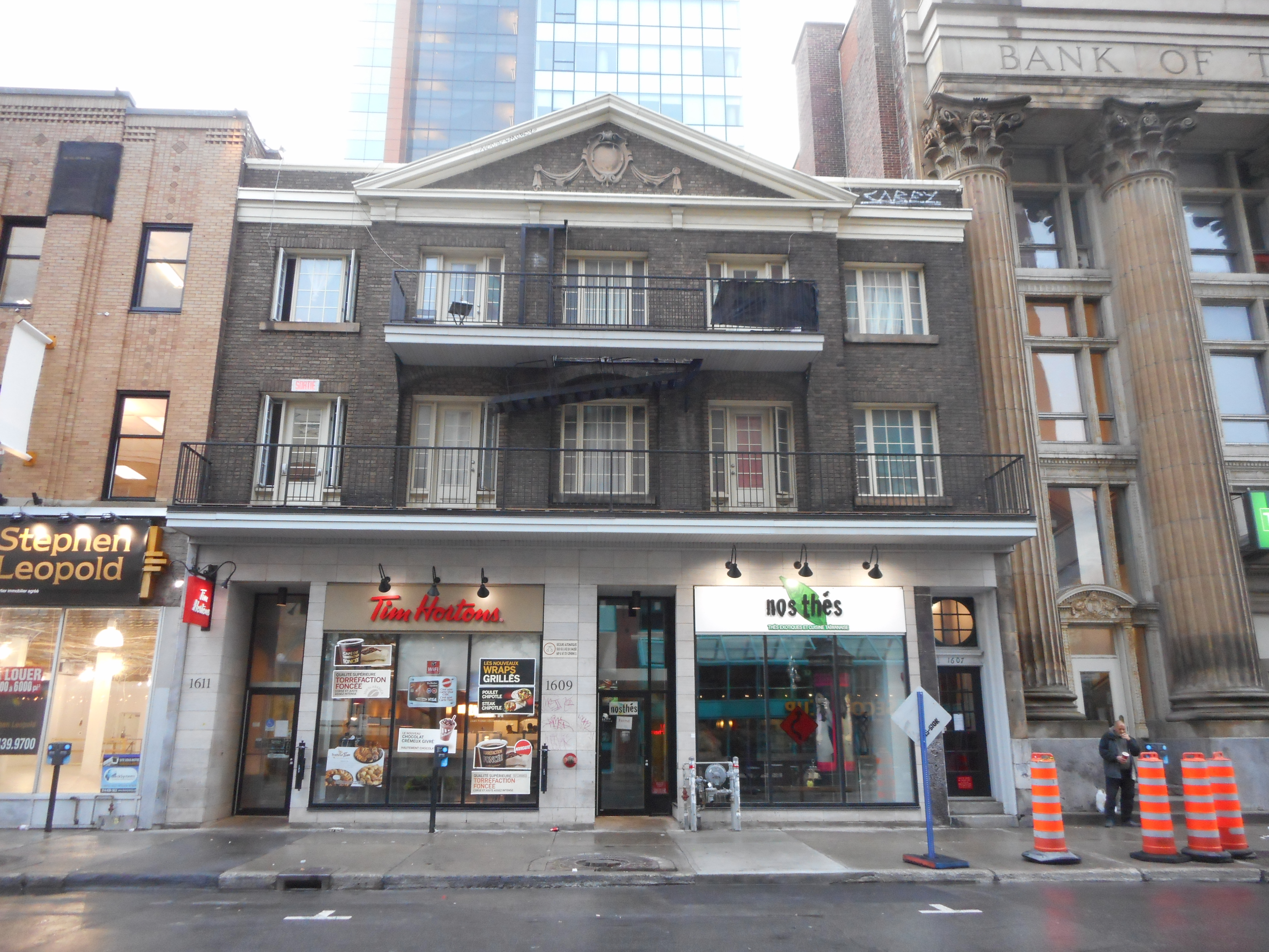 1607-1611 rue Sainte-Catherine Ouest, Montréal